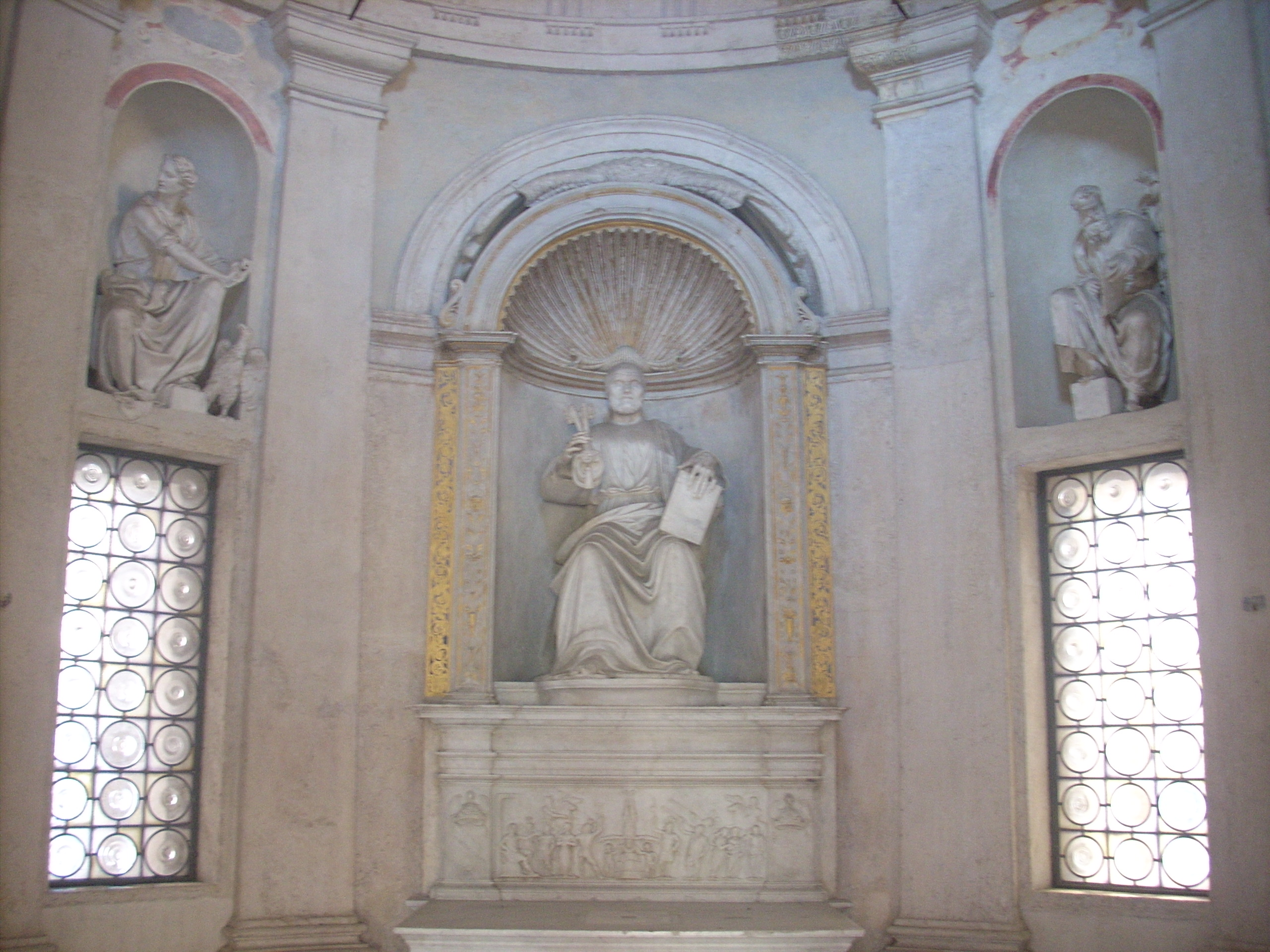 Roma, Tempietto, interiore: Statua di S. Pietro e rilievo della sua crocifissione che secondo la tradizione si svolse in questo luogo